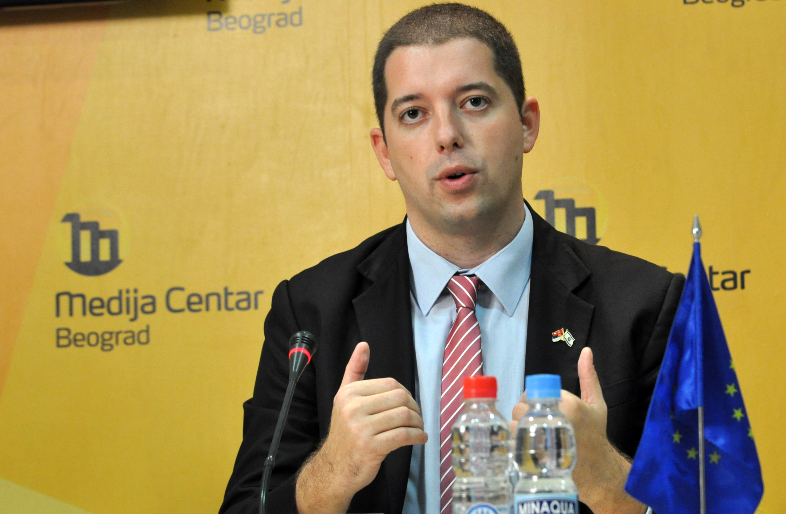 Marko Djuric 2014